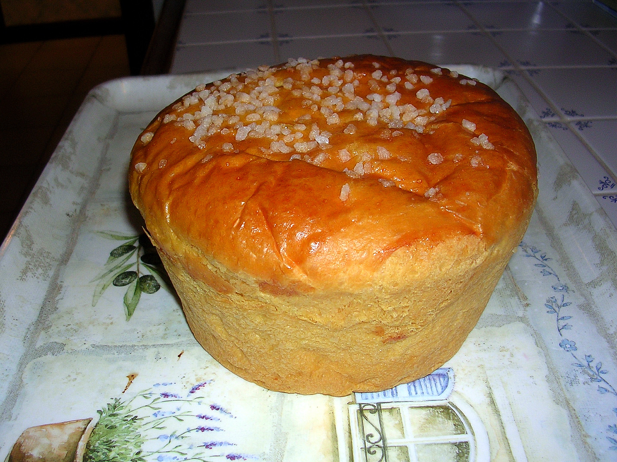 Pastis landais, brioche traditionnelle des Landes de Gascogne